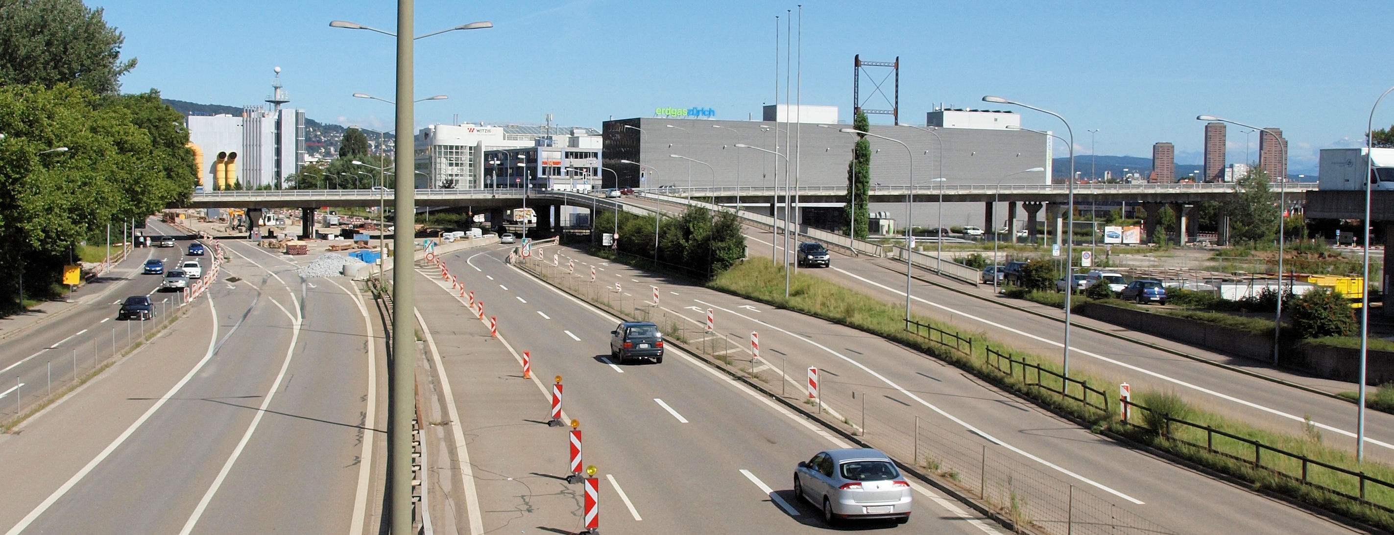 Die Europabrücke in Zürich. Überführung über das Autobahnende der A1 sowie der Bernstasse Nord und Bernstrasse Süd.